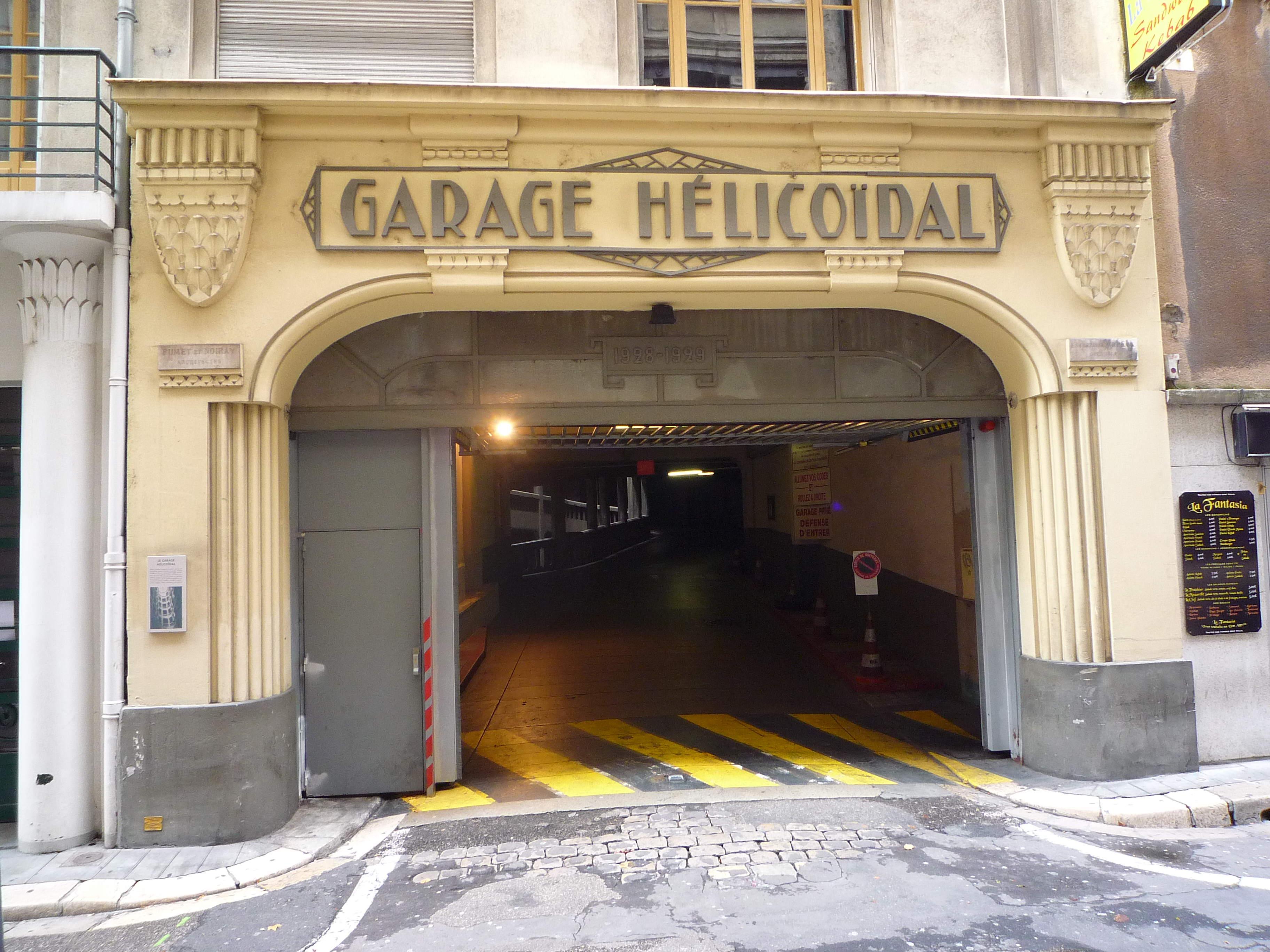 Entrée garage hélicoïdale de Grenoble (rue Bressieux)